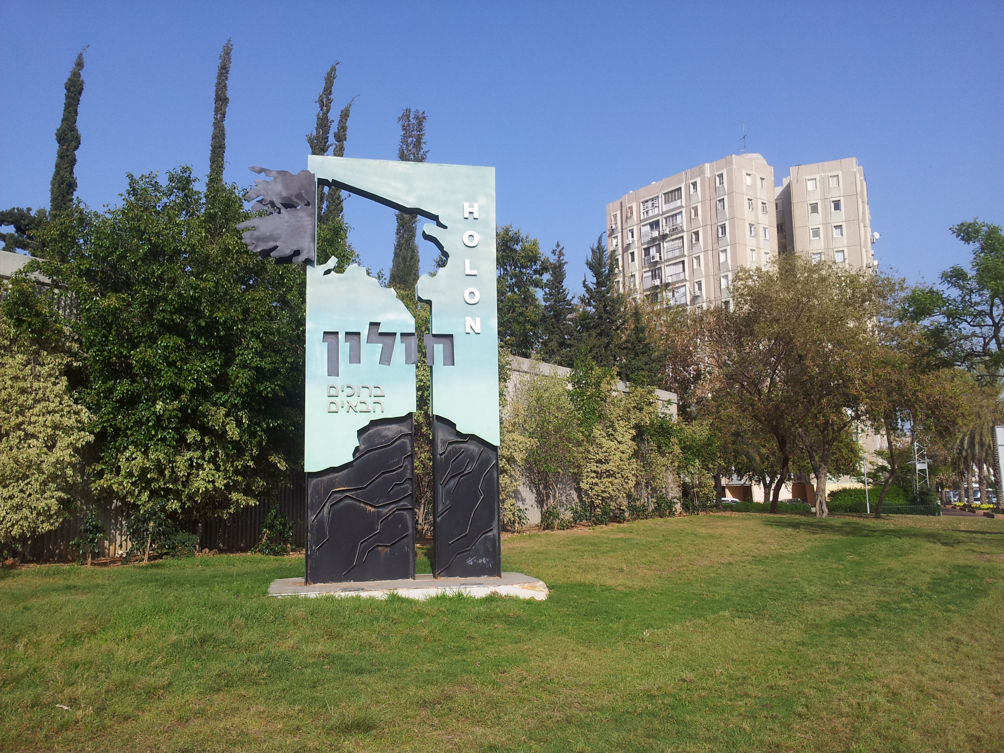 פסל עץ השקמה של חולון בכניסה לעיר ממחלף יוספטל